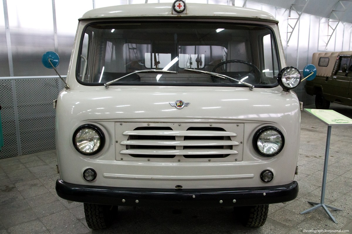 УАЗ-450А (годы выпуска 1955-1965)Выставочный павильон-музей УАЗа.